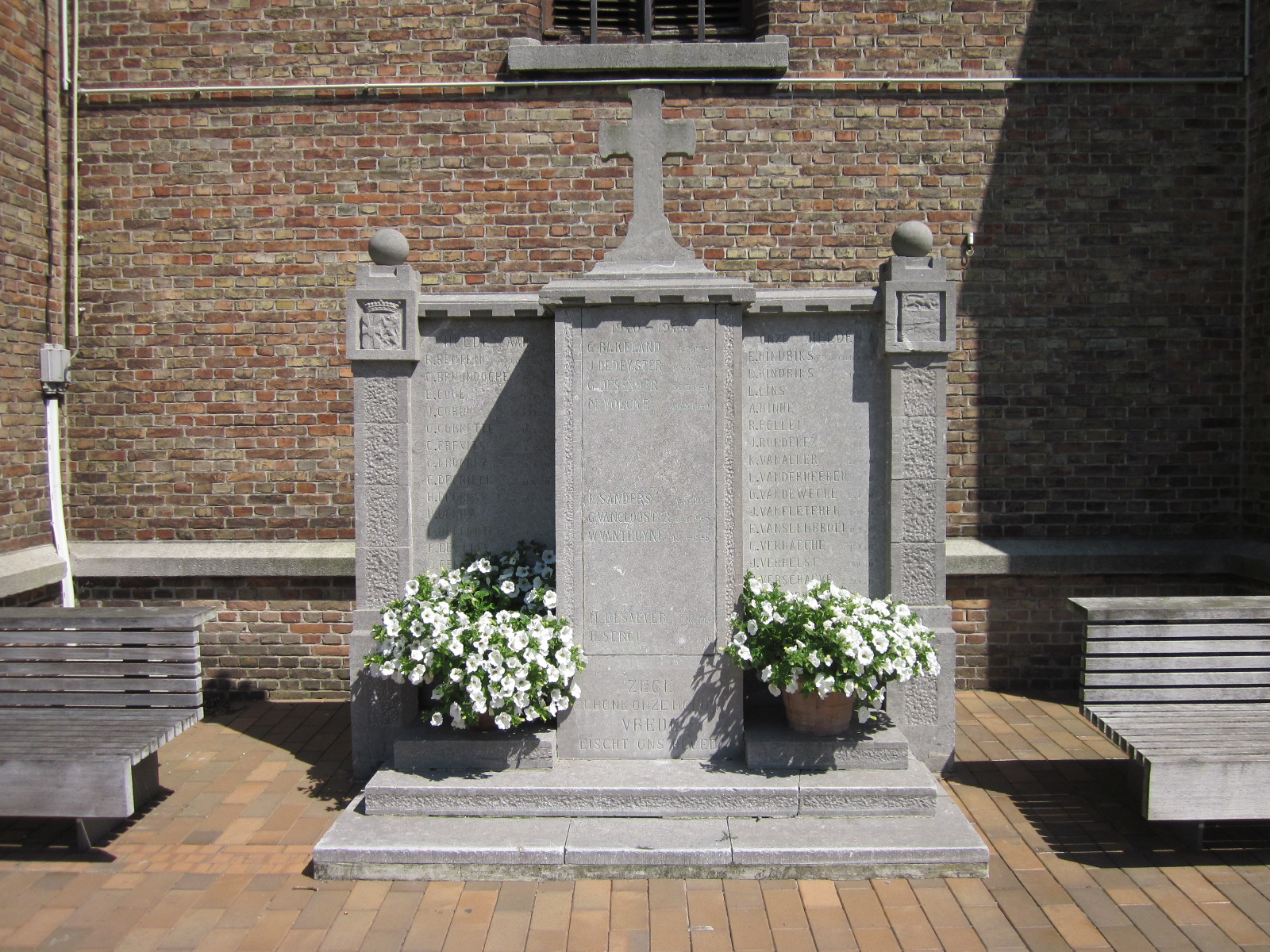 Oorlogsgedenkteken voor de Kortemarkse burgerlijke en militaire slachtoffers van beide wereldoorlogen tegen de westelijke muur van de toren van de Sint-Bartholomeuskerk van Kortemark